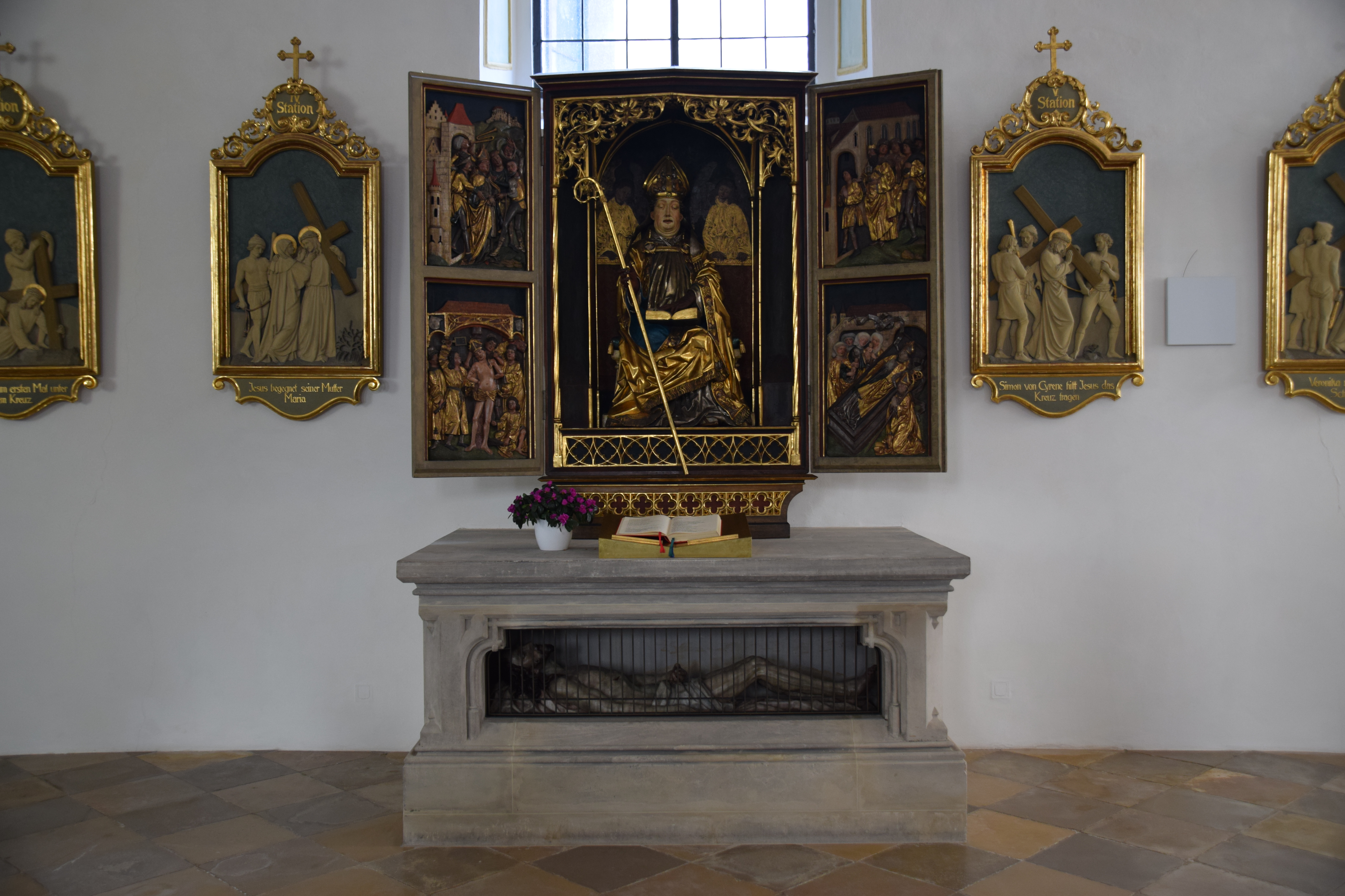 Spätgotischer Kassiansaltar der Stiftspfarrkirche St. Kassian in Regensburg